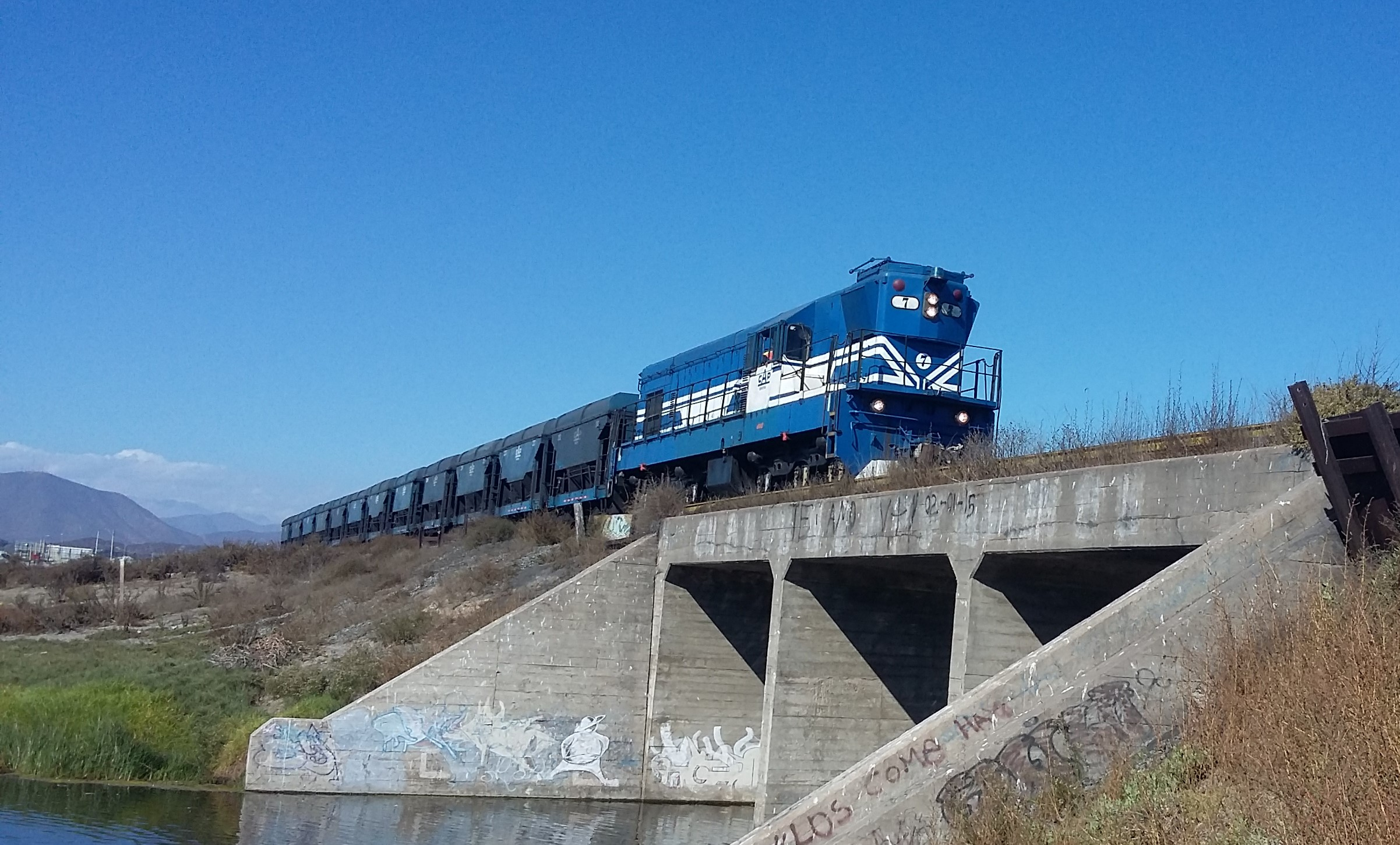 Transporte mineral de hierro en Coquimbo